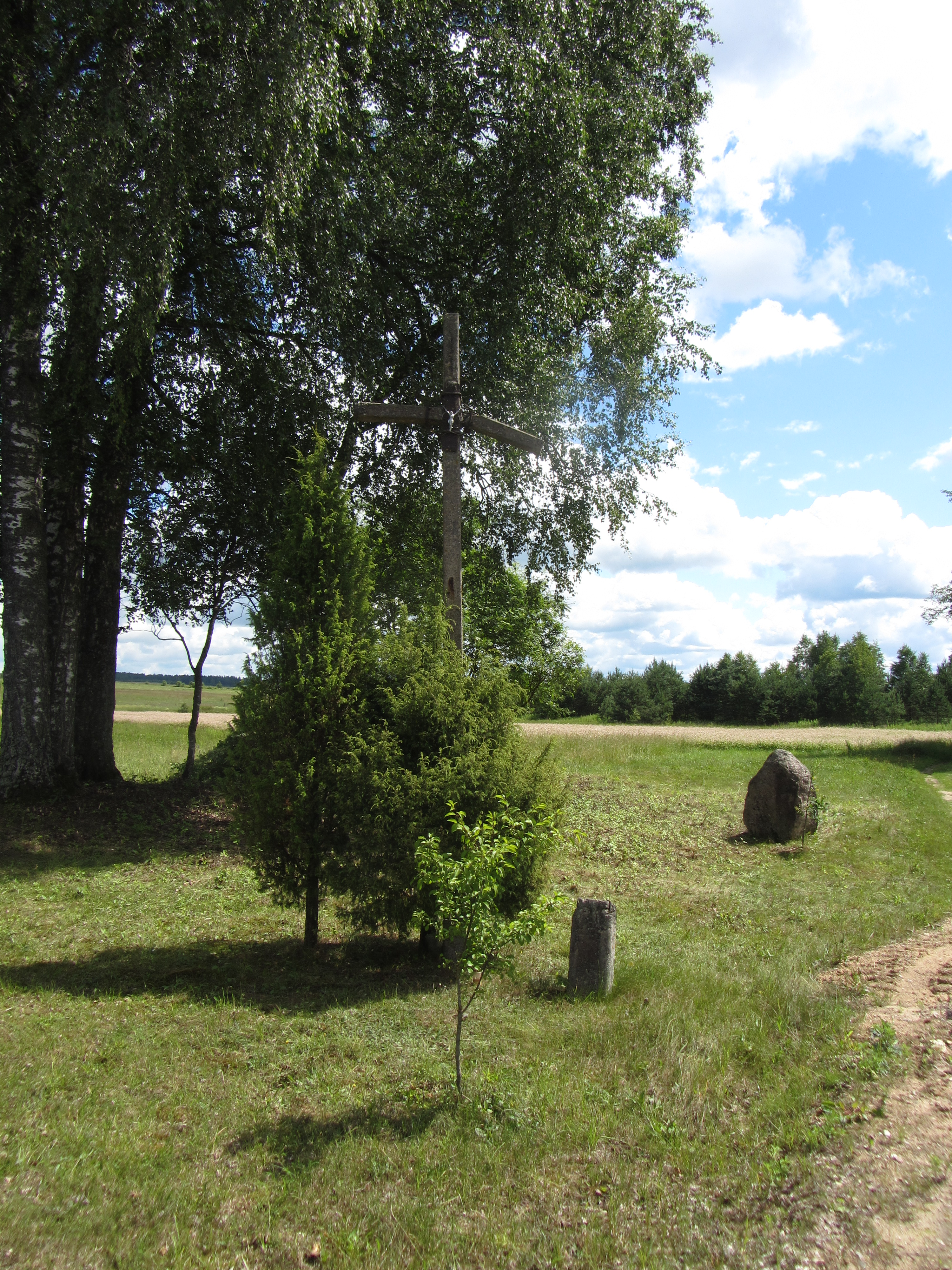 Vidutinė, Lithuania